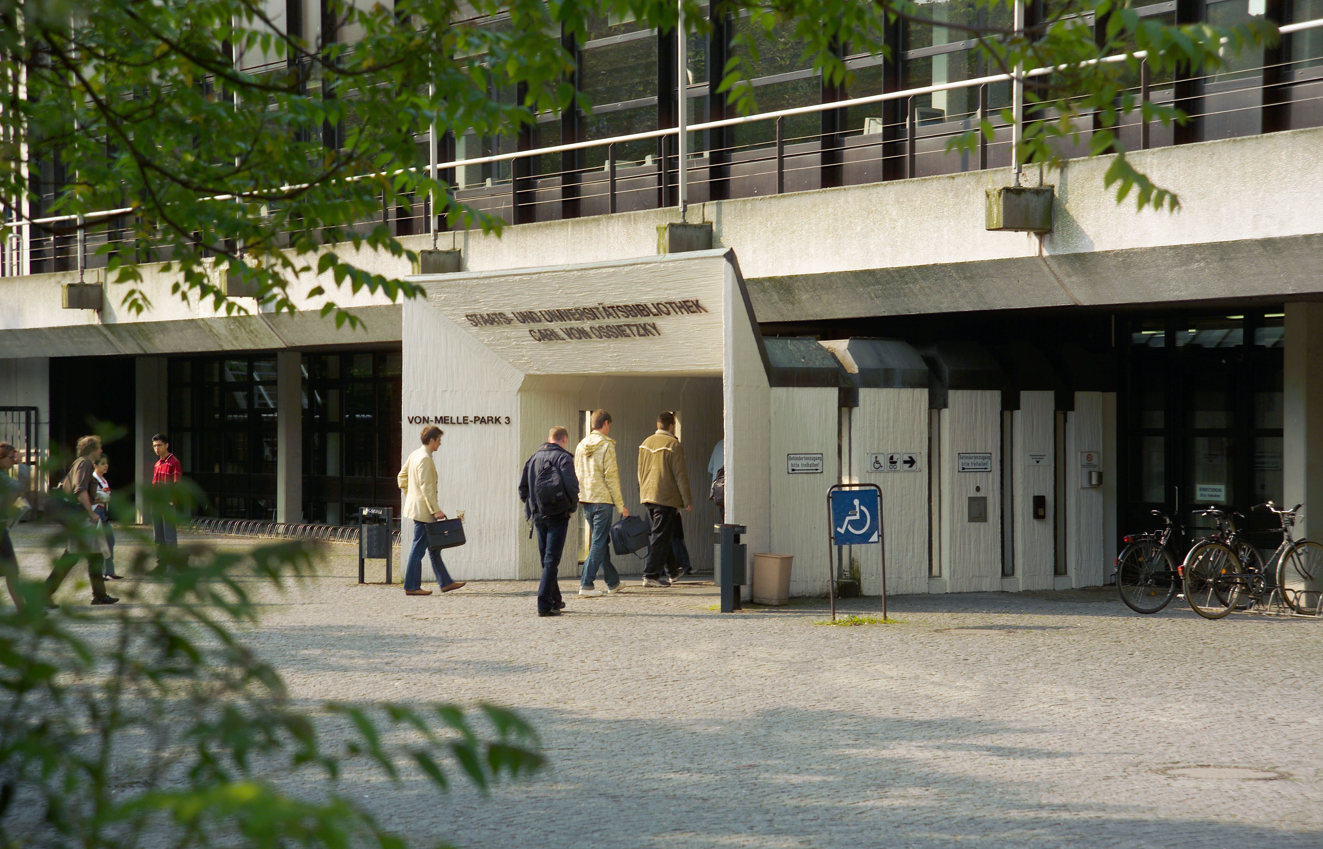 Staats- und Universitätsbibliothek Hamburg (Haupteingang)